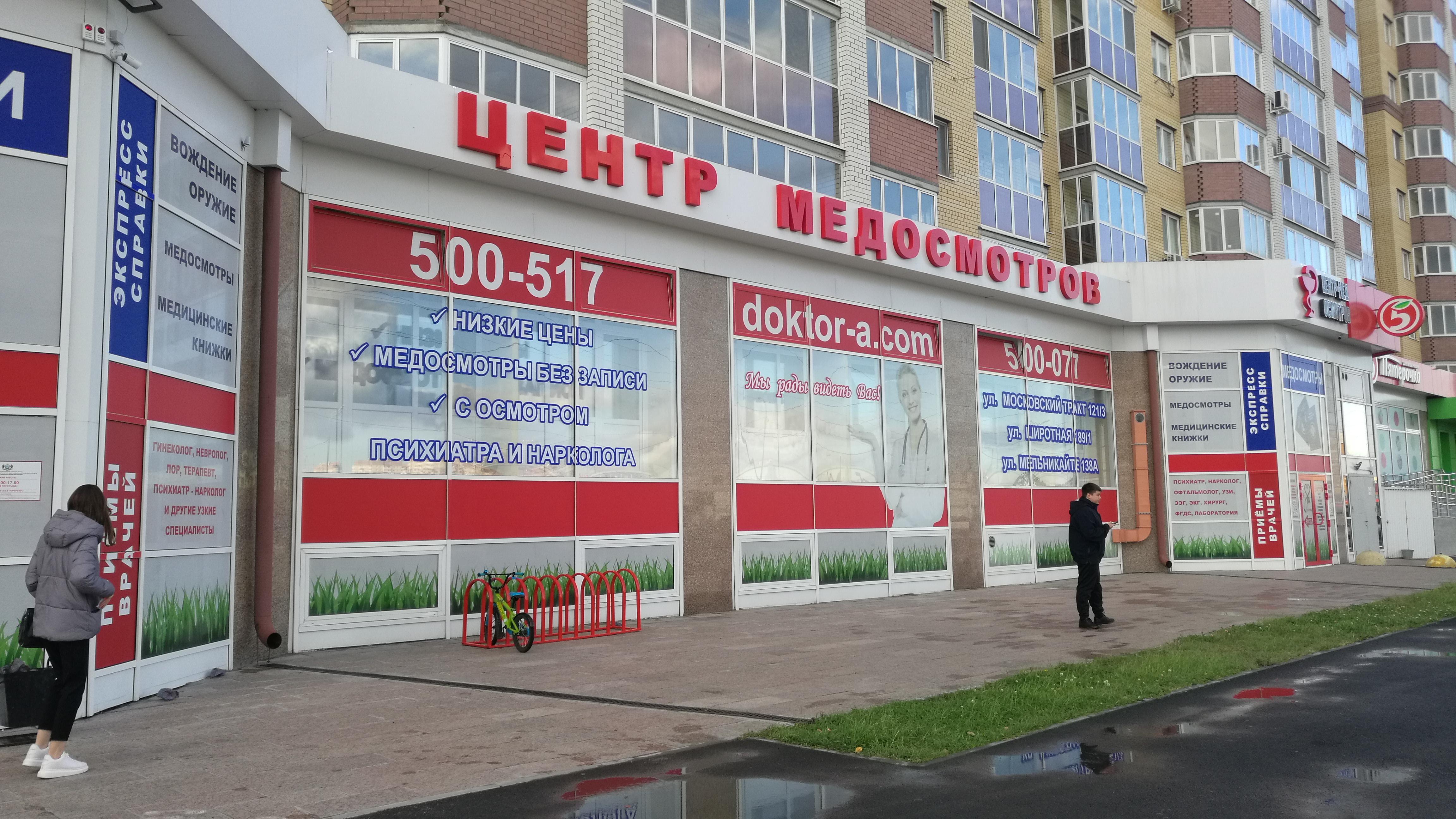 La centro pri sanekzamenado Doktoro A. Tjumeno, Rusio.